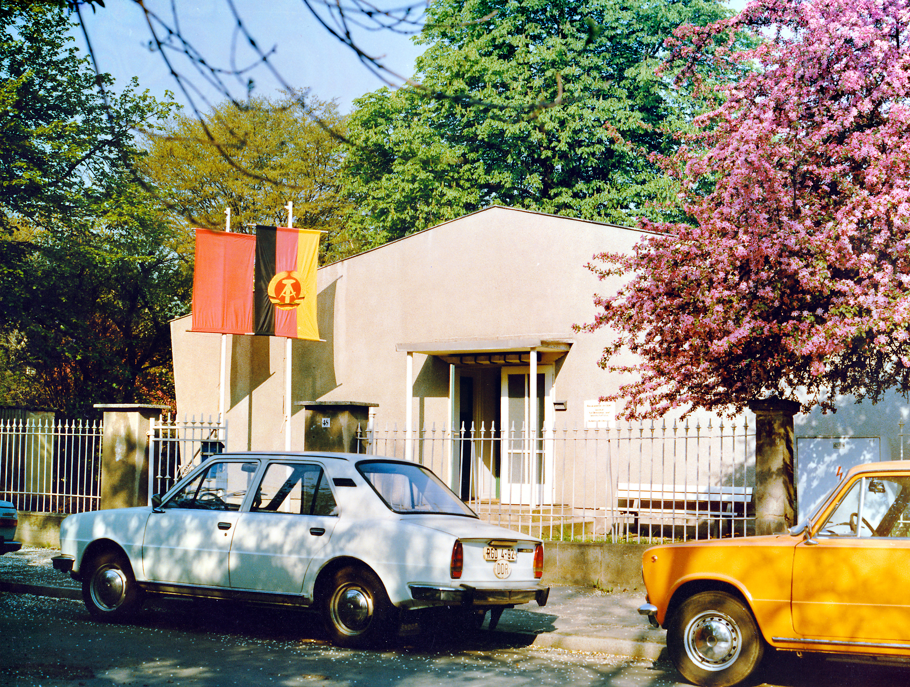 05.05.1986 8027 [01187] Dresden-Plauen/Südvorstadt, Hohe Straße 48 (GMP: 51.032340,13.713801): Baracke der Außenstelle Dresden der Bauakademie der DDR, Institut für Wohnungs- und Gesellschaftsbau (IWG), später Institut für Betonforschung (IfB). Auch Sitz der Leitstelle für Ökonomische Materialverwendung im Wohnungs- und Gesellschaftsbau der DDR (Leitstelle ÖMV). Beflaggt vom 1. Mai bis zum 8. Mai (Tag der Befreiung). Gebäude nach der Wende abgerissen. [R19860504A30.TIF]19860505021AR.JPG(c)Blobelt